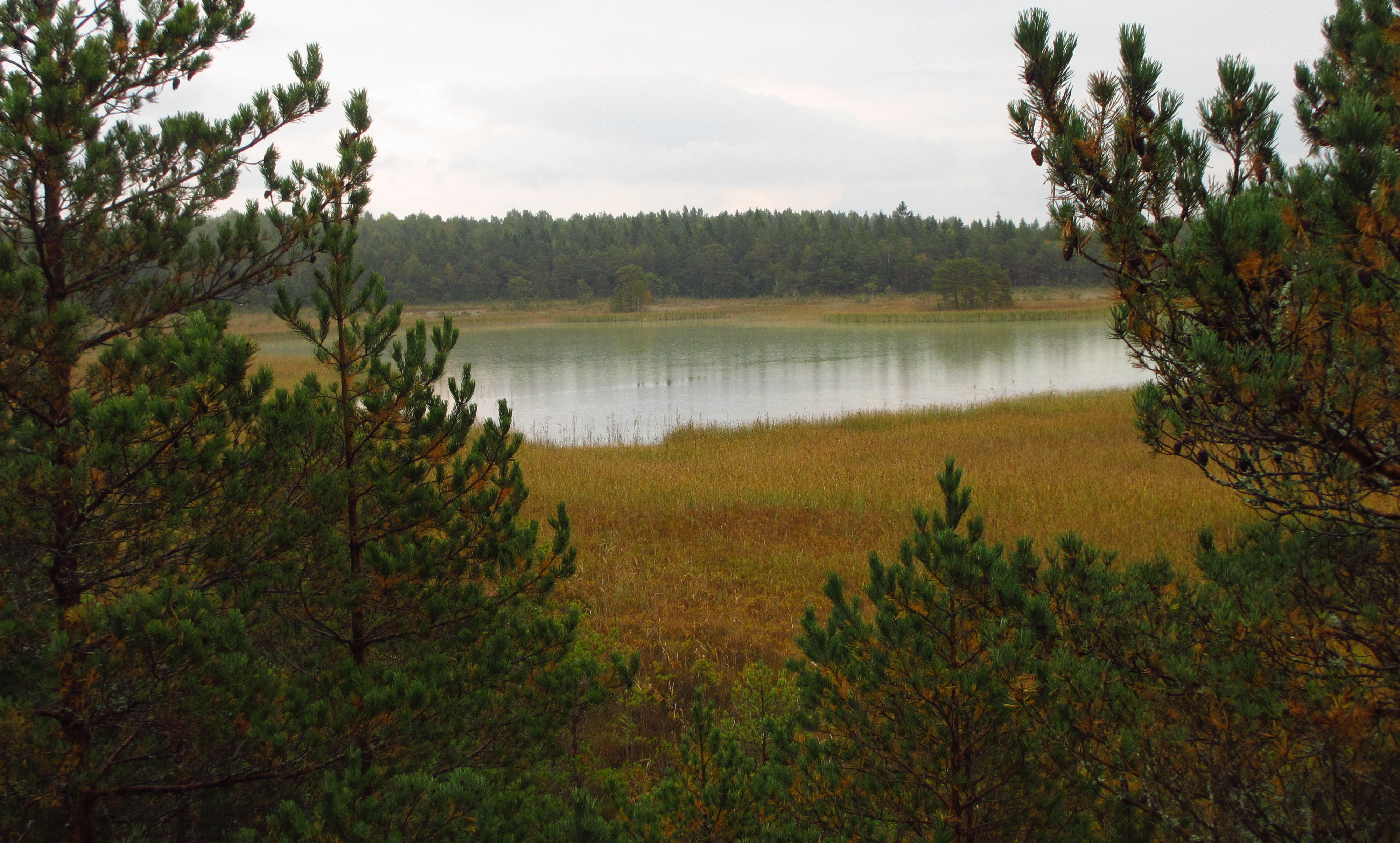 Turvaste Valgejärv Valgejärve MKA-l